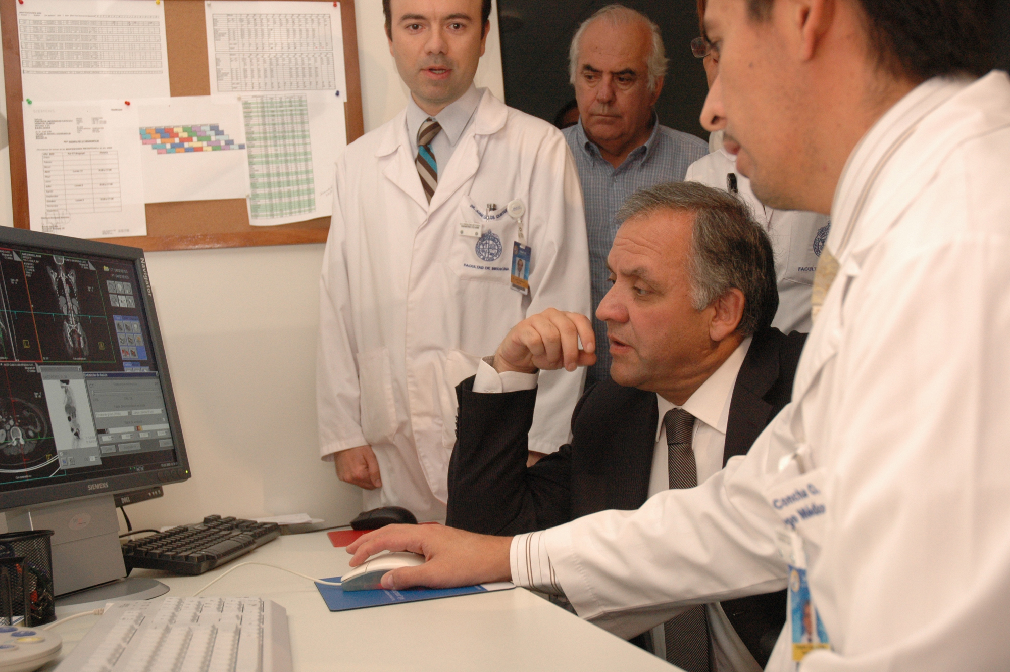 Las dependencias permiten desarrollar un nuevo modelo en el manejo de los pacientes complejos: en un mismo sector, en pisos consecutivos, están los procedimientos diagnósticos y terapéuticos más modernos para tratar patologías graves, principalmente las cardíacas y vasculares.